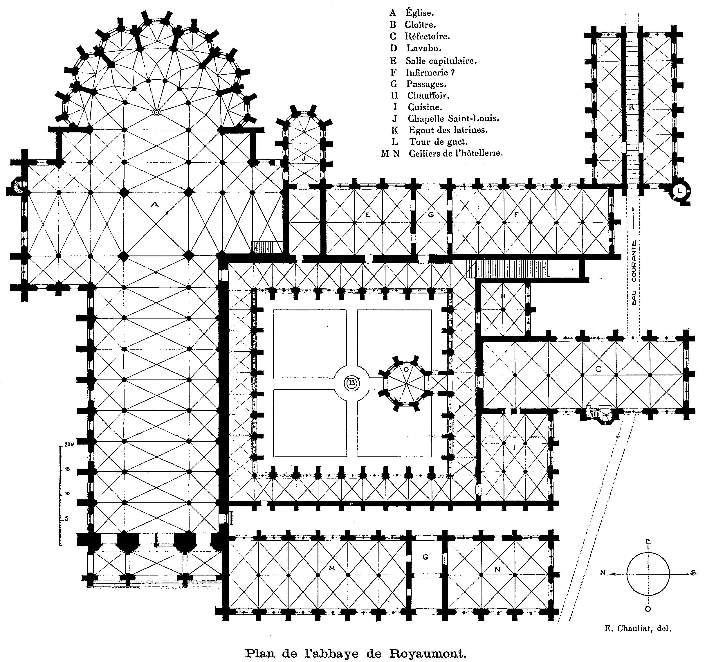 Plan des masses de l'abbaye de Royaumont avant la démolition de l'abbatiale.